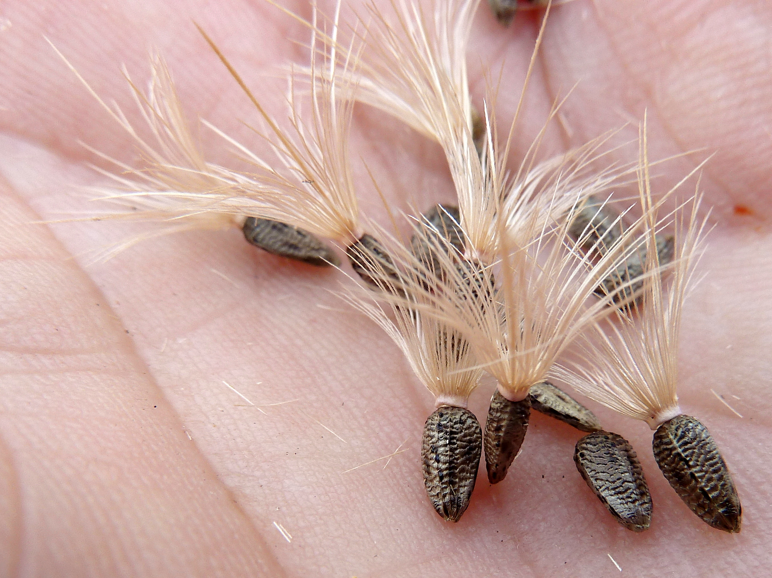 Onopordum acanthium : cipselas sueltas, casi todas con su vilano. - circa Estación de contenedores de RENFE/ADIF de Abroñigal/Embajadores, Madrid (España).